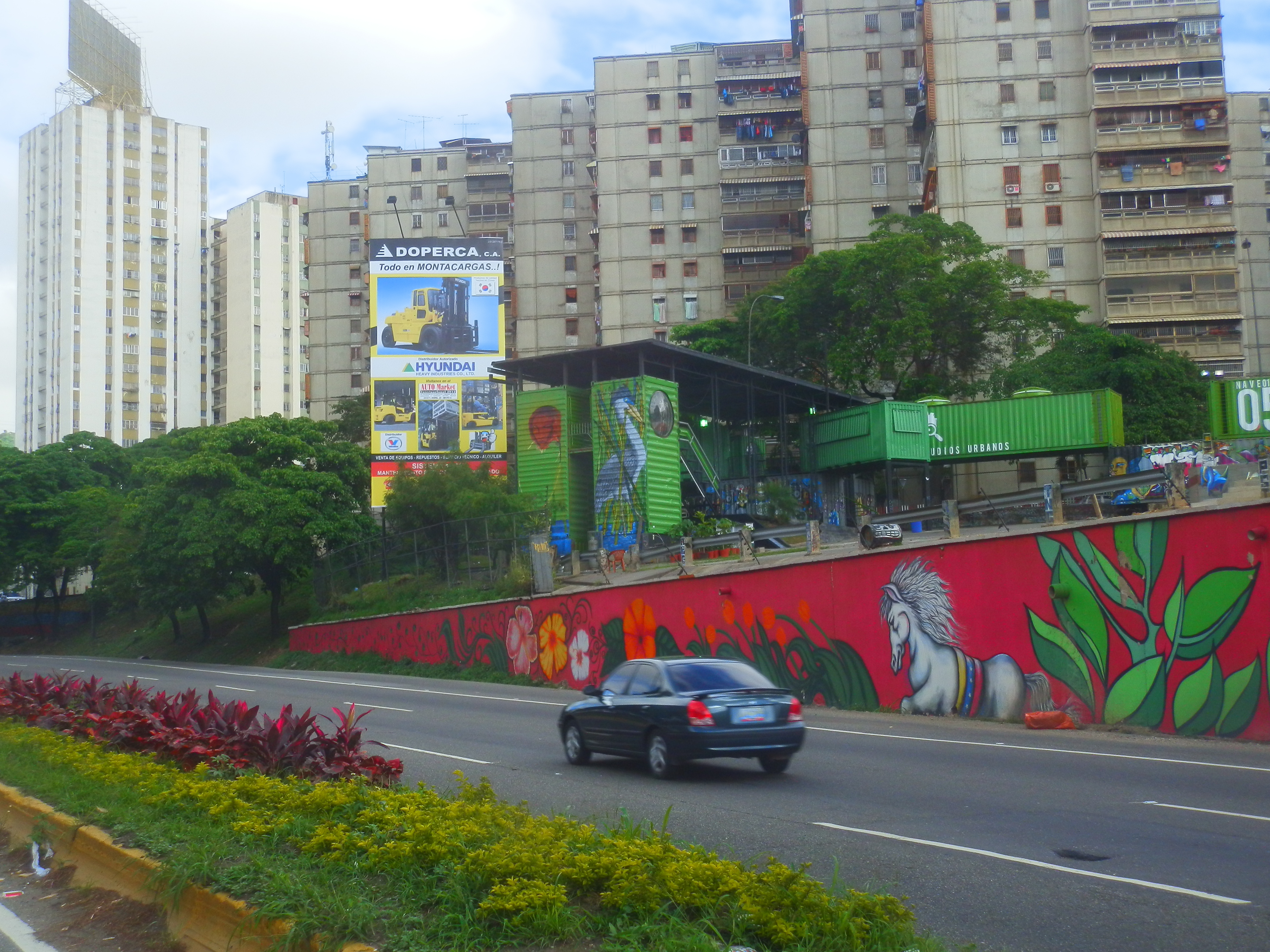 Cultura: Murales sobre el bicentenario de Venezuela en la parroquia El Valle, Caracas, Venezuela